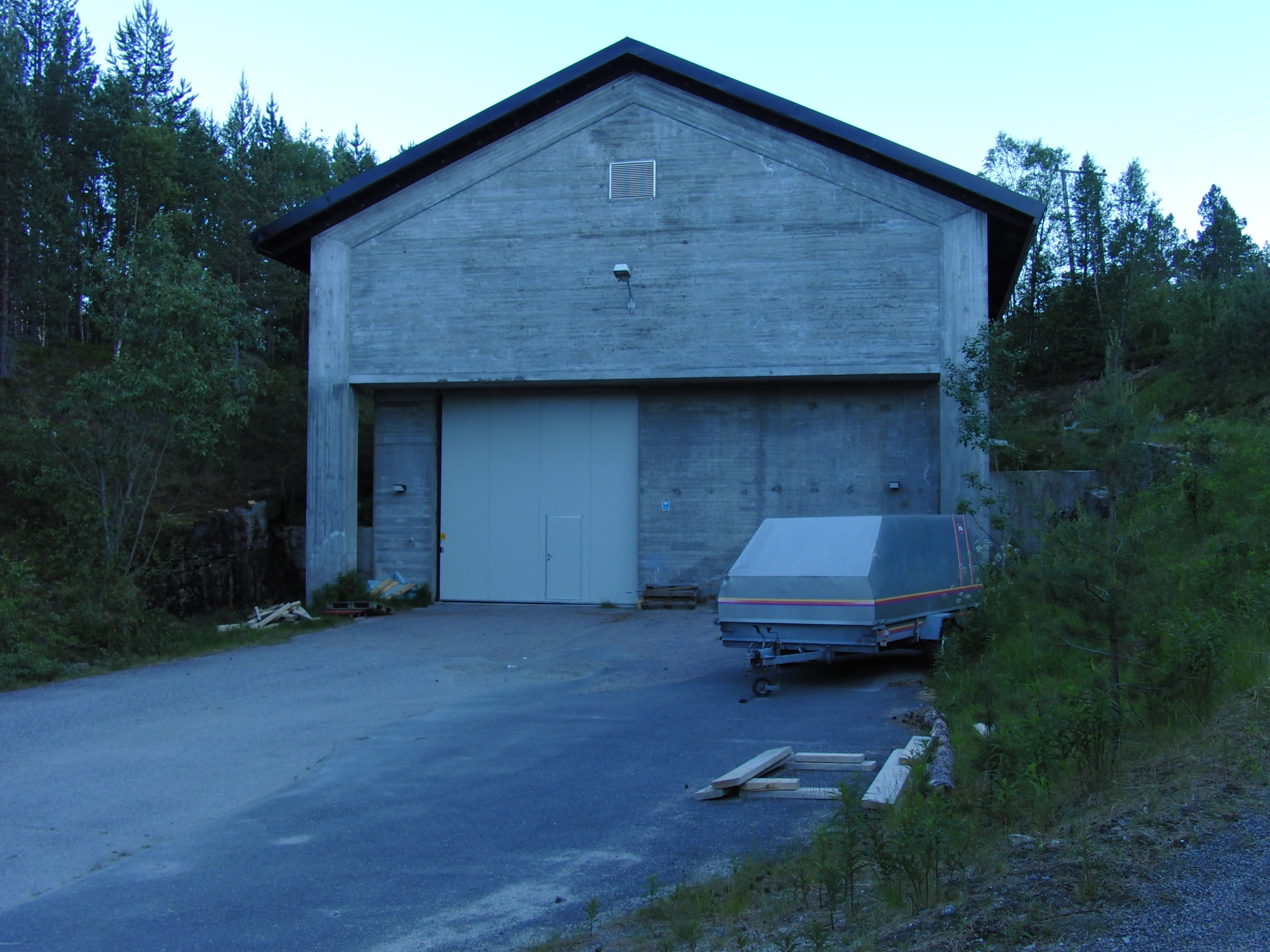 Sagfossen kraftverk (Hamarøy)